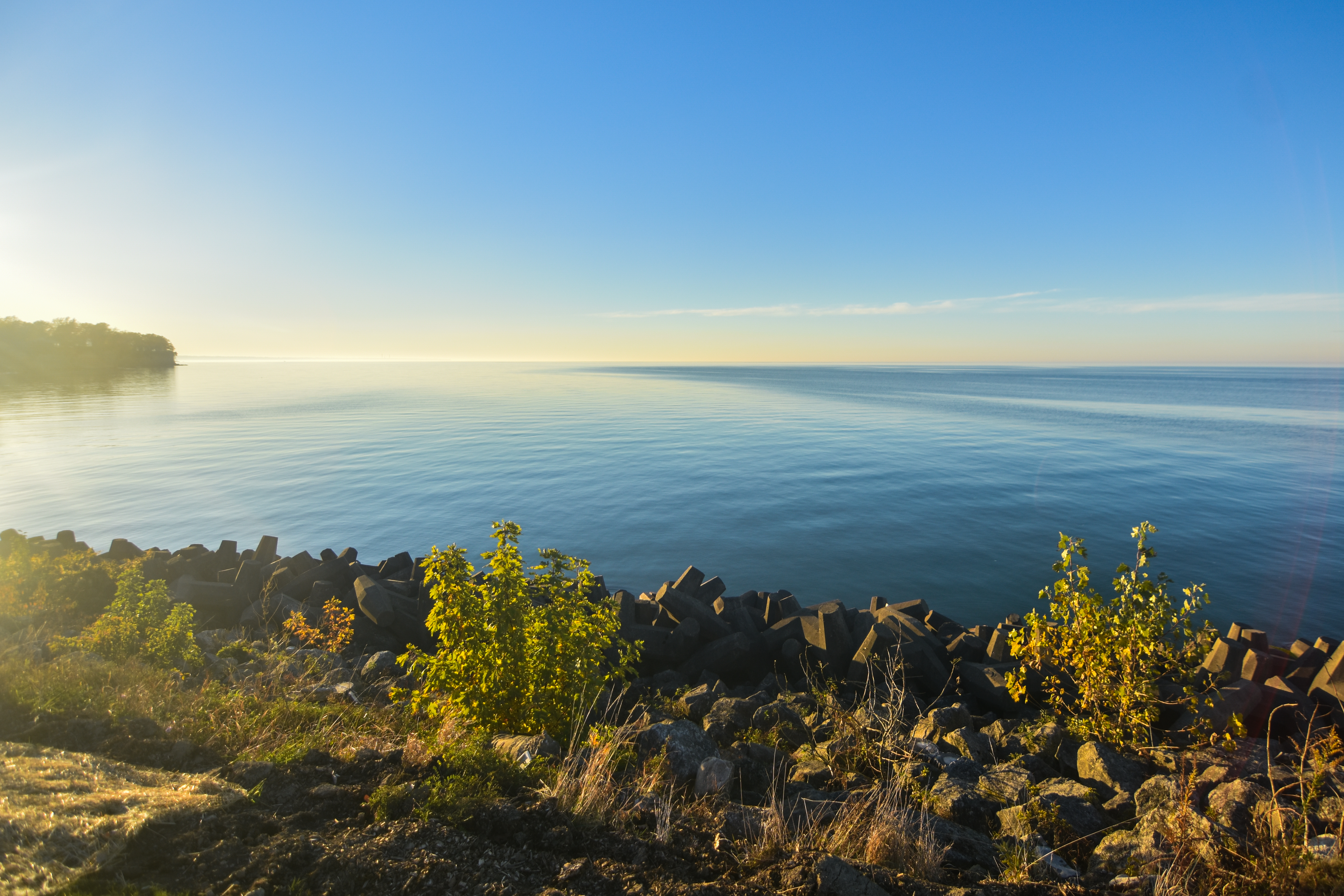 Lakewood Park